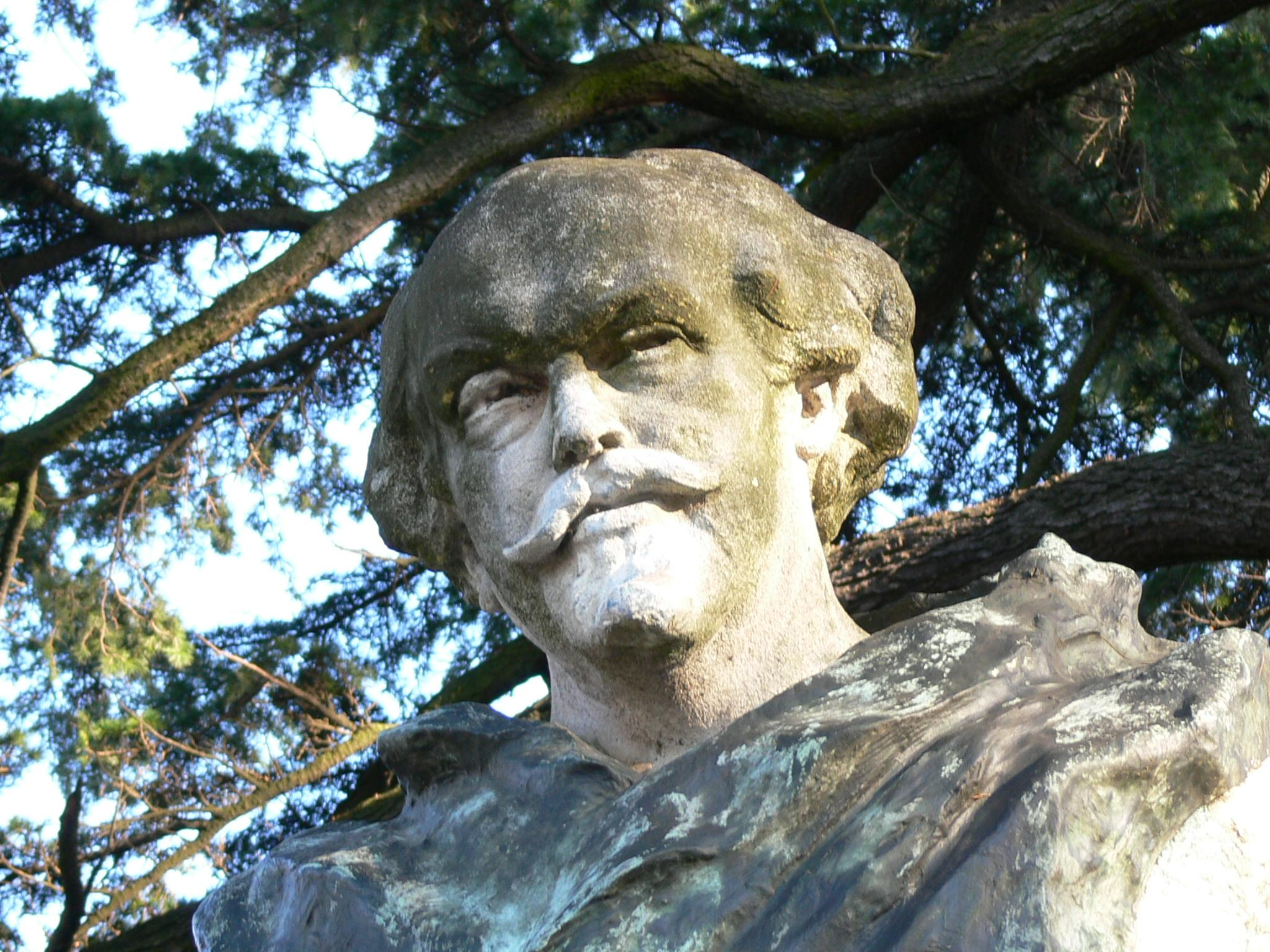 Buste de Louis Gallet dans le parc Jouvet à Valence - Drôme - France sculpture de Jean-Antoine Injalbert Photo prise par Jacques Forêt (Sequajectrof) le 22 janvier 2006.